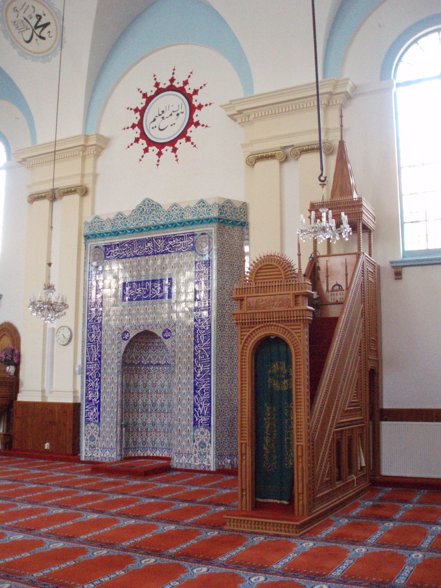 Aksa Mosque, Den Haag, Netherlands